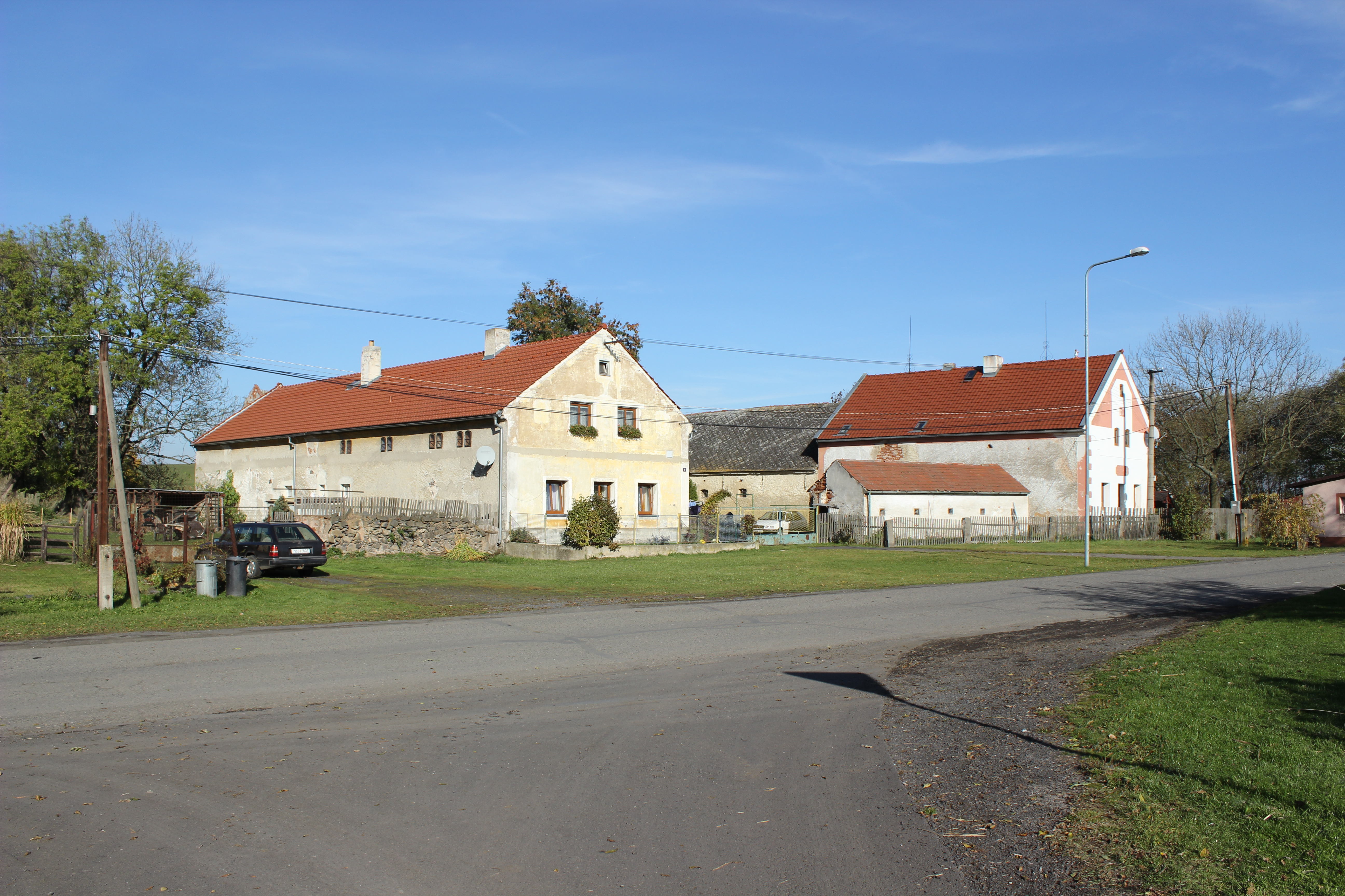 Zástavba v Mokré, části Čichalov. Vpředu dům číslo popisné 9, za ním objekt číslo popisné 10.